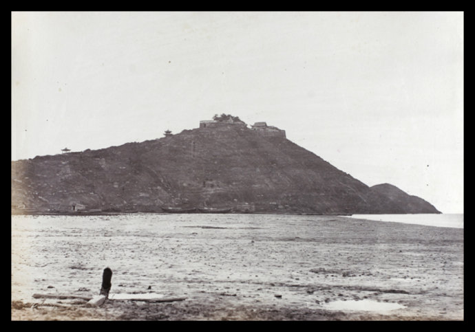 Old Zhenhai in 1860s